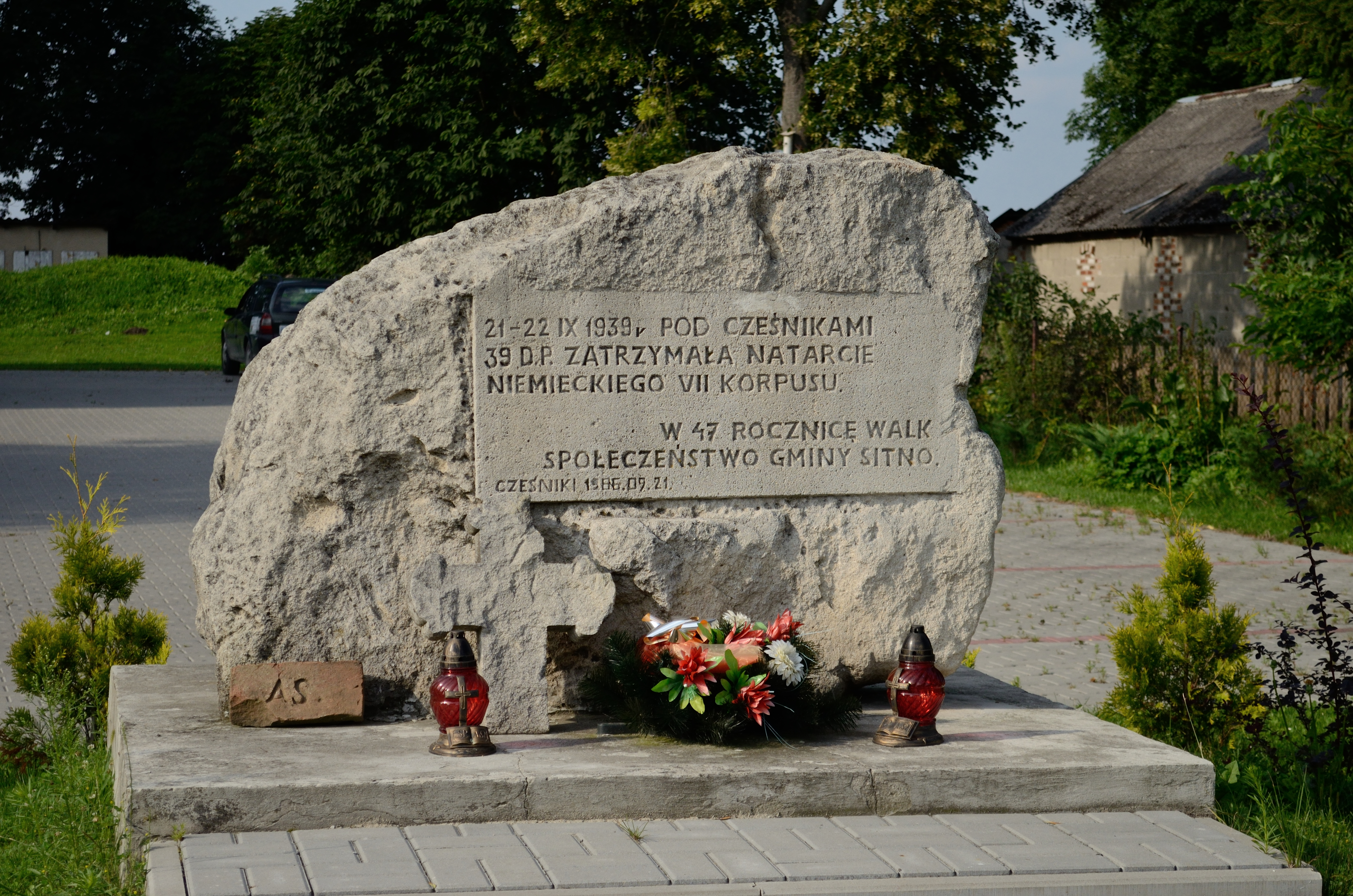 Hrob ve vesnici Cześniki, Polsko